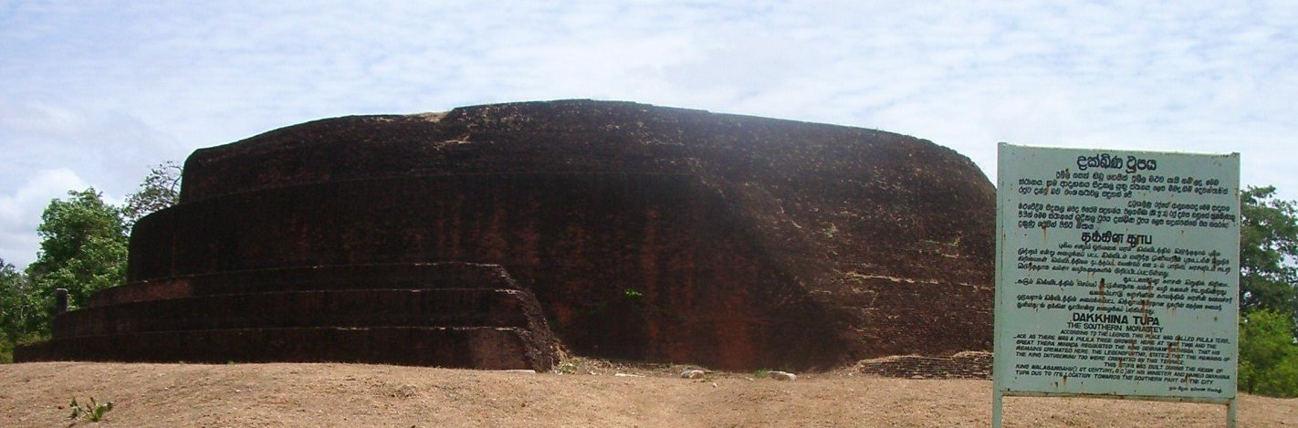 Pagoda de Dakkhina Tupa a Anuradhapura, foto feta per J. Ollé el juliol del 2006